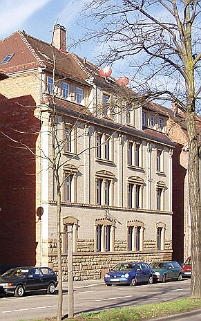 Ausschnitt aus unten genannter Quelle